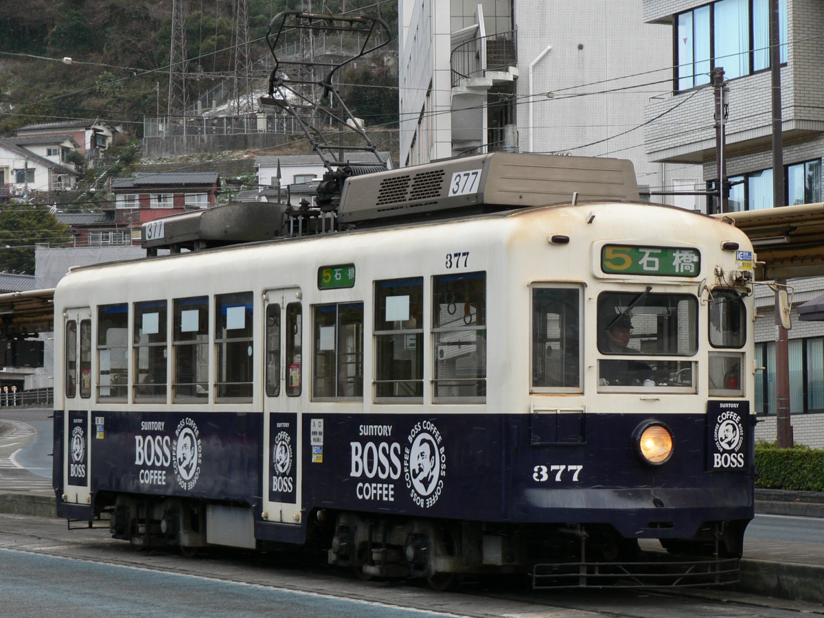 長崎電気軌道377号。標準の塗装をベースにした全面広告。